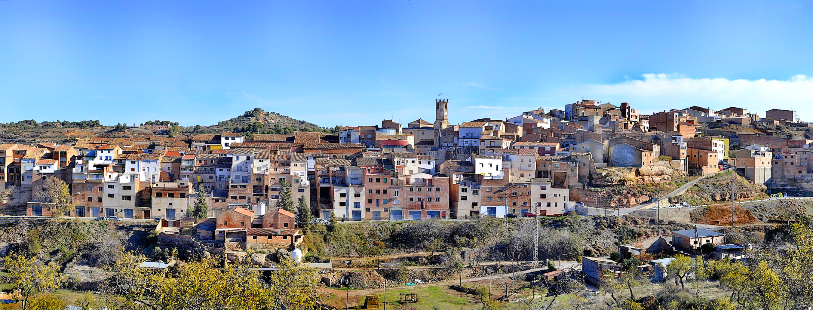 Vista panorámica de Juncosa de las Garrigas (Lleida)